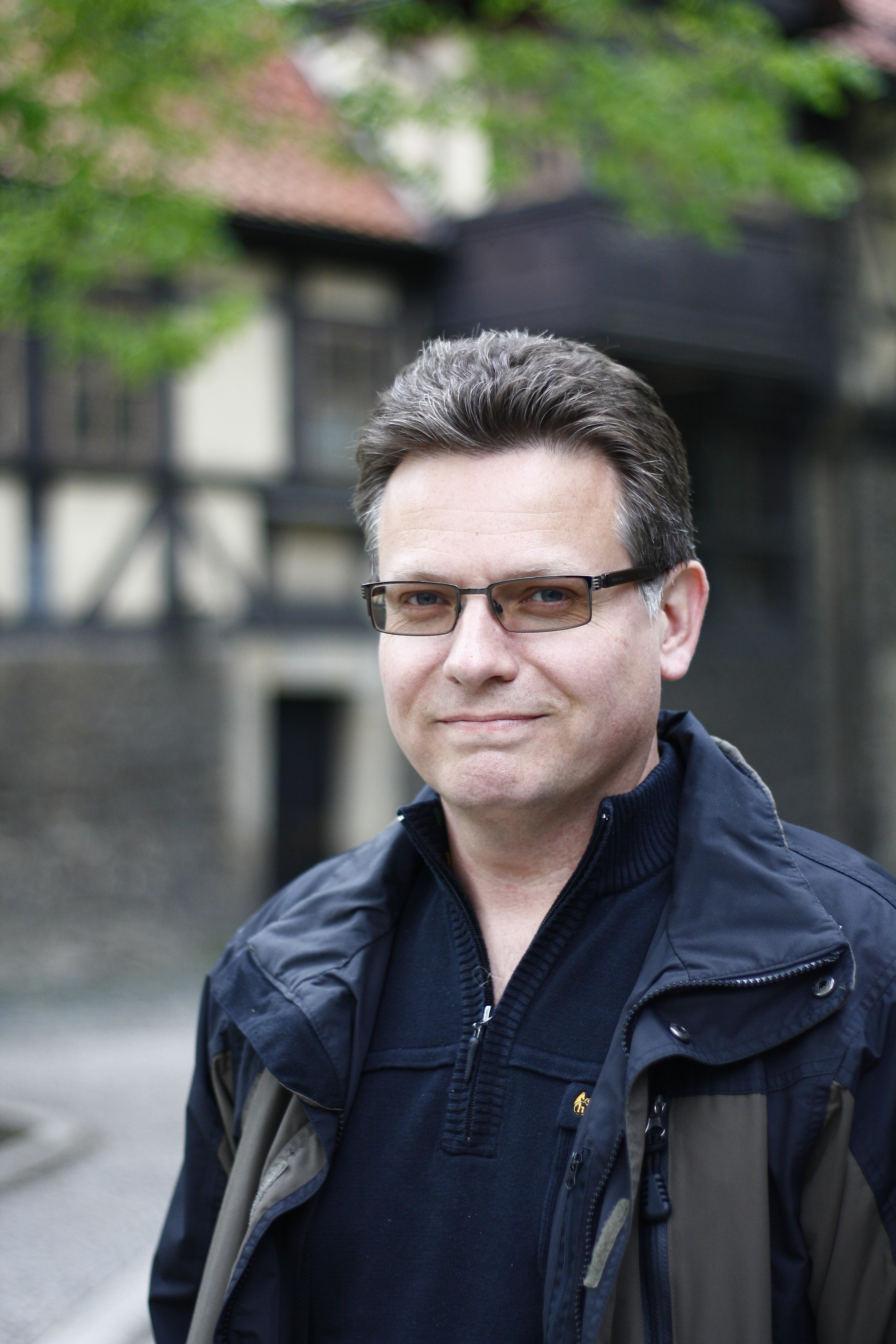 Komponist Bernhard Schneyer vor Fachwerkhäusern seiner Geburtsstadt Wernigerode